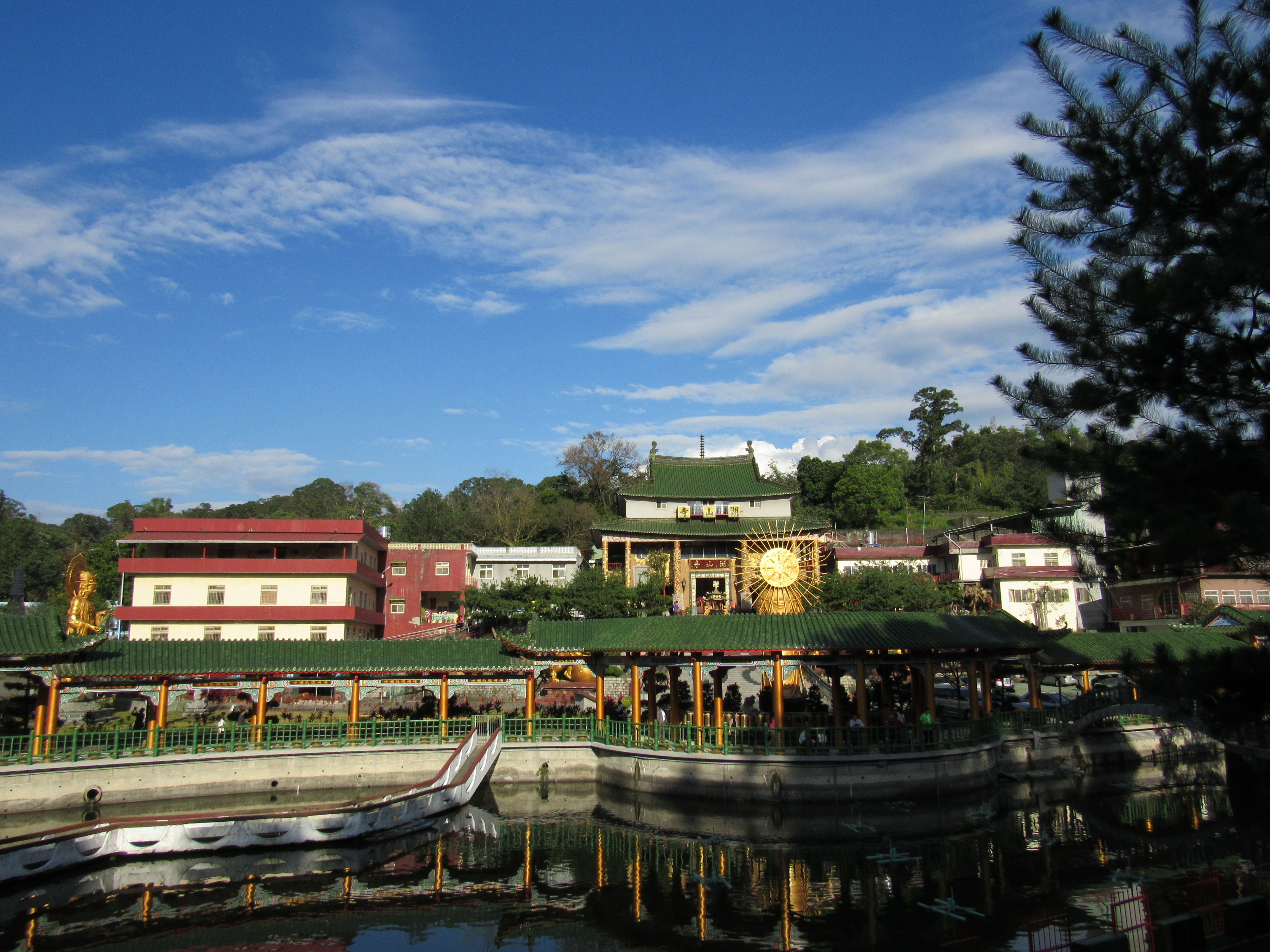 中文（台灣）: 水池前的湖山寺